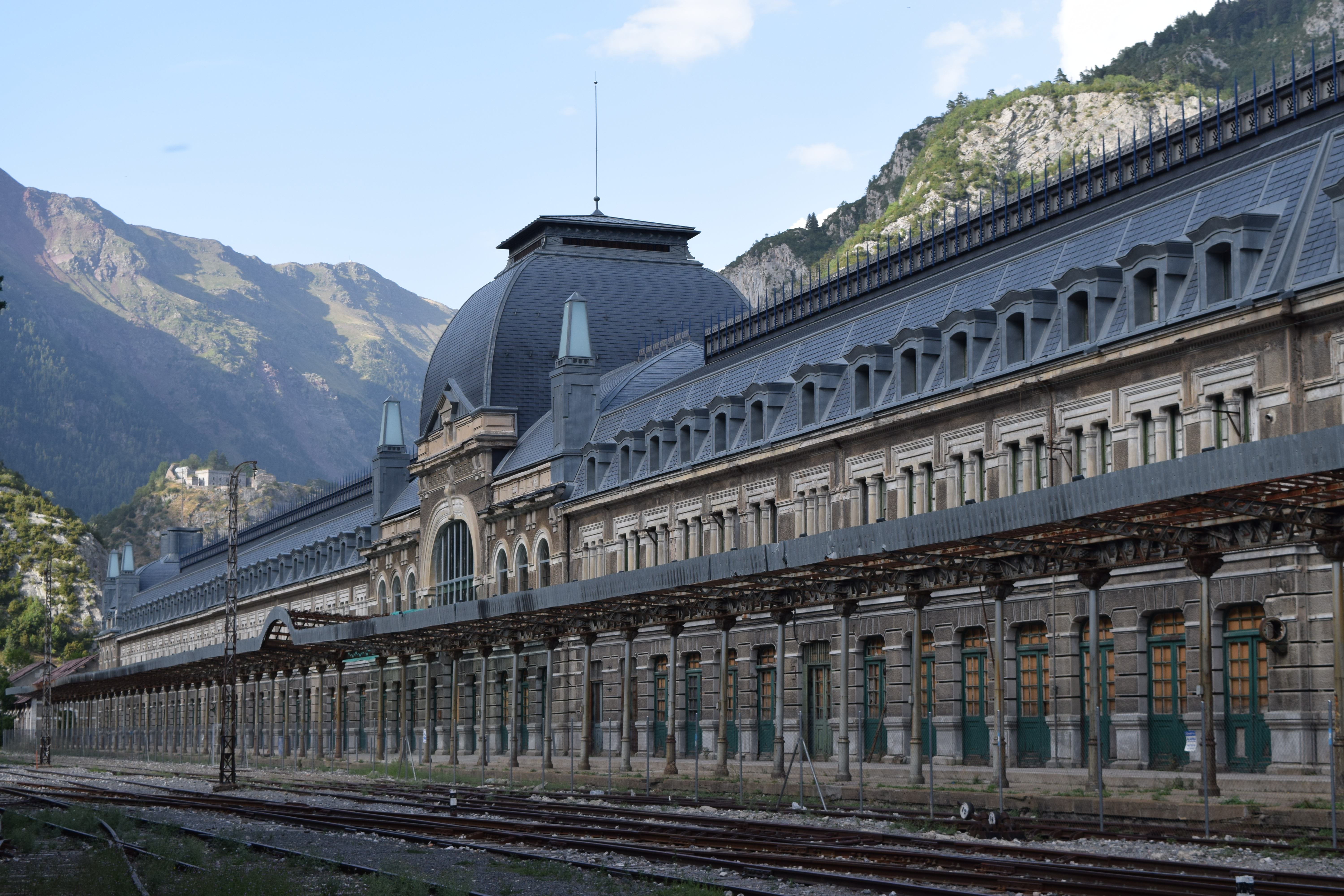 Imatge de la façana de l'estació Internacional de Canfranc (Osca, Aragó), que anteriorment unia França i Espanya en tren. Actualment, de l'interior de l'estació només es pot visitar el vestíbul mitjançant visites guiades. El codi de monument és el